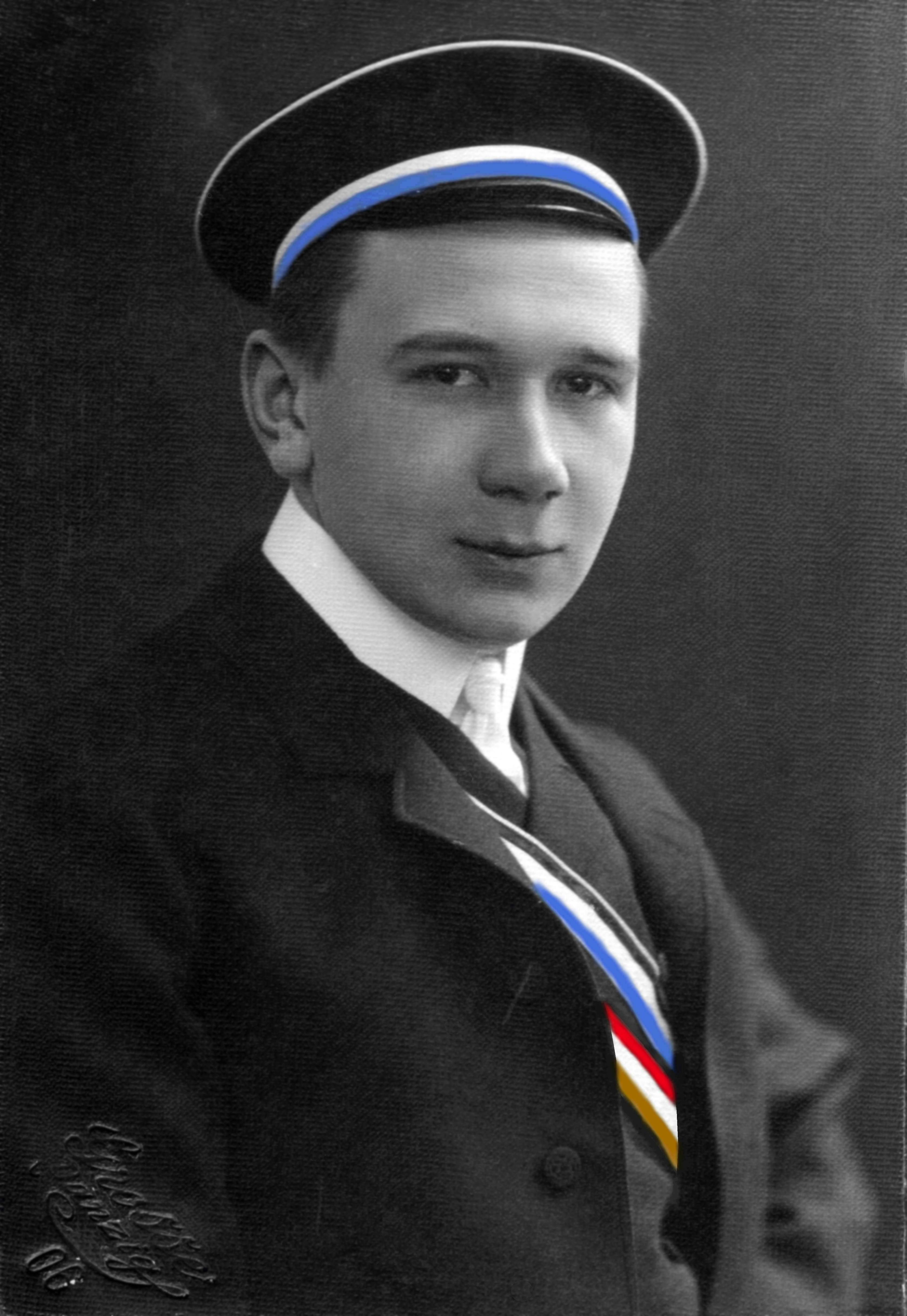 Porträtfotografie von Kurt Poll († 1943).